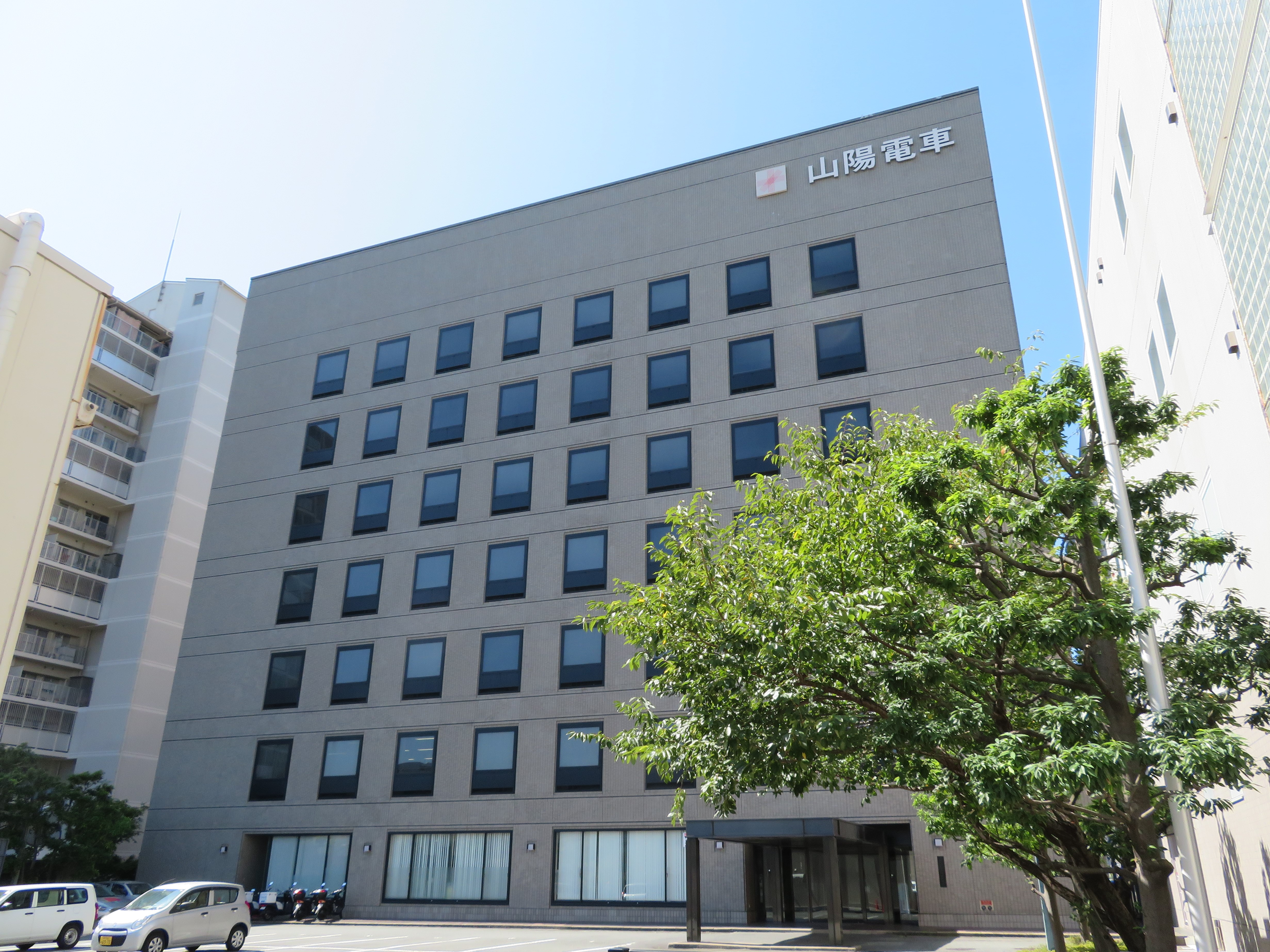 山陽電気鉄道本社